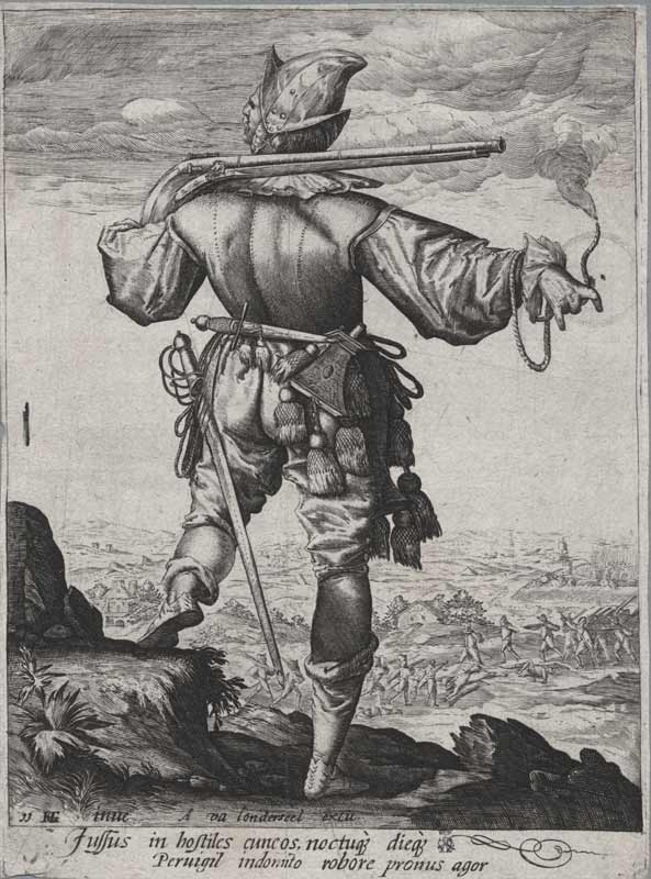 Darstellung eines Arkebusenschützen um 1600